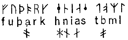 мэнские руны. сайт Арильда Хауге